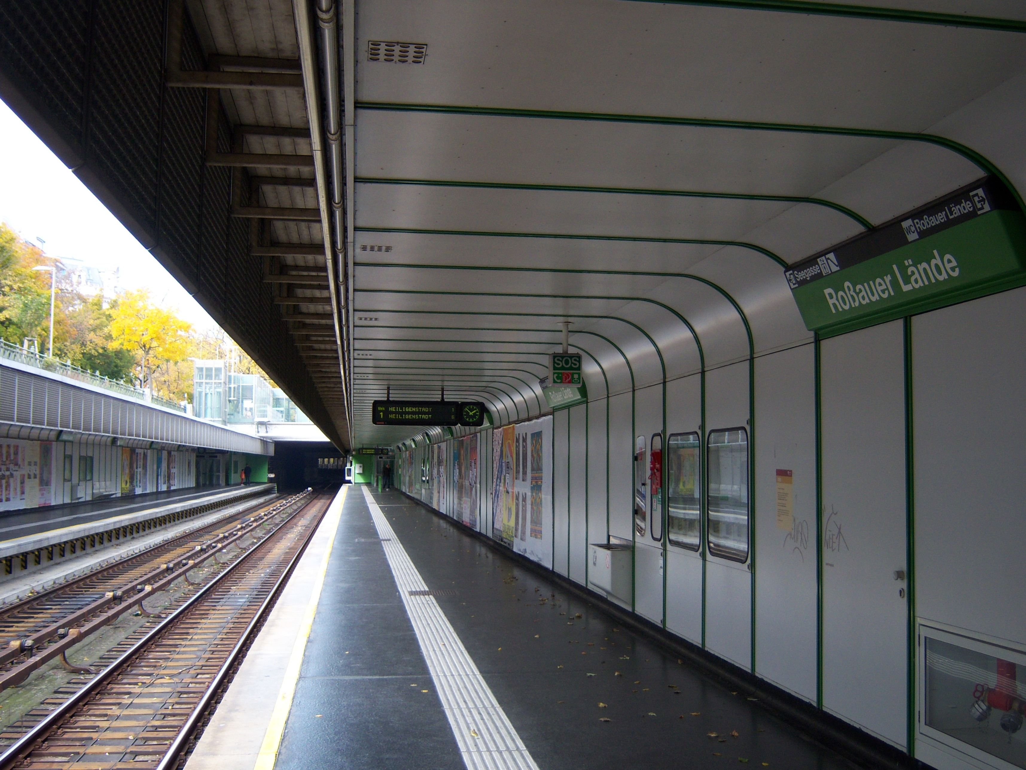 U-Bahn-Station Roßauer Lände